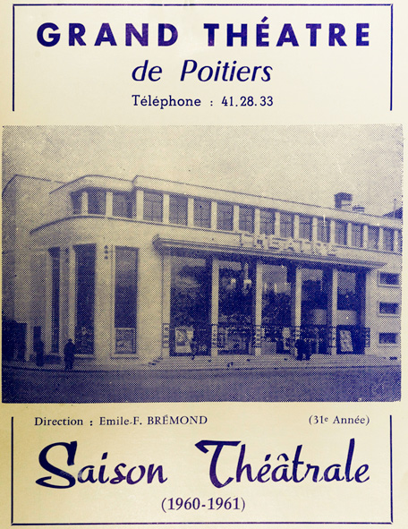 Publicité anonyme pour la saison théâtrale à Poitiers, 1960